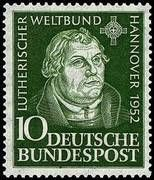 Fédération mondiale Luthérienne / Lutherischer Weltbund (timbre RFA / Briefmarke BRD)